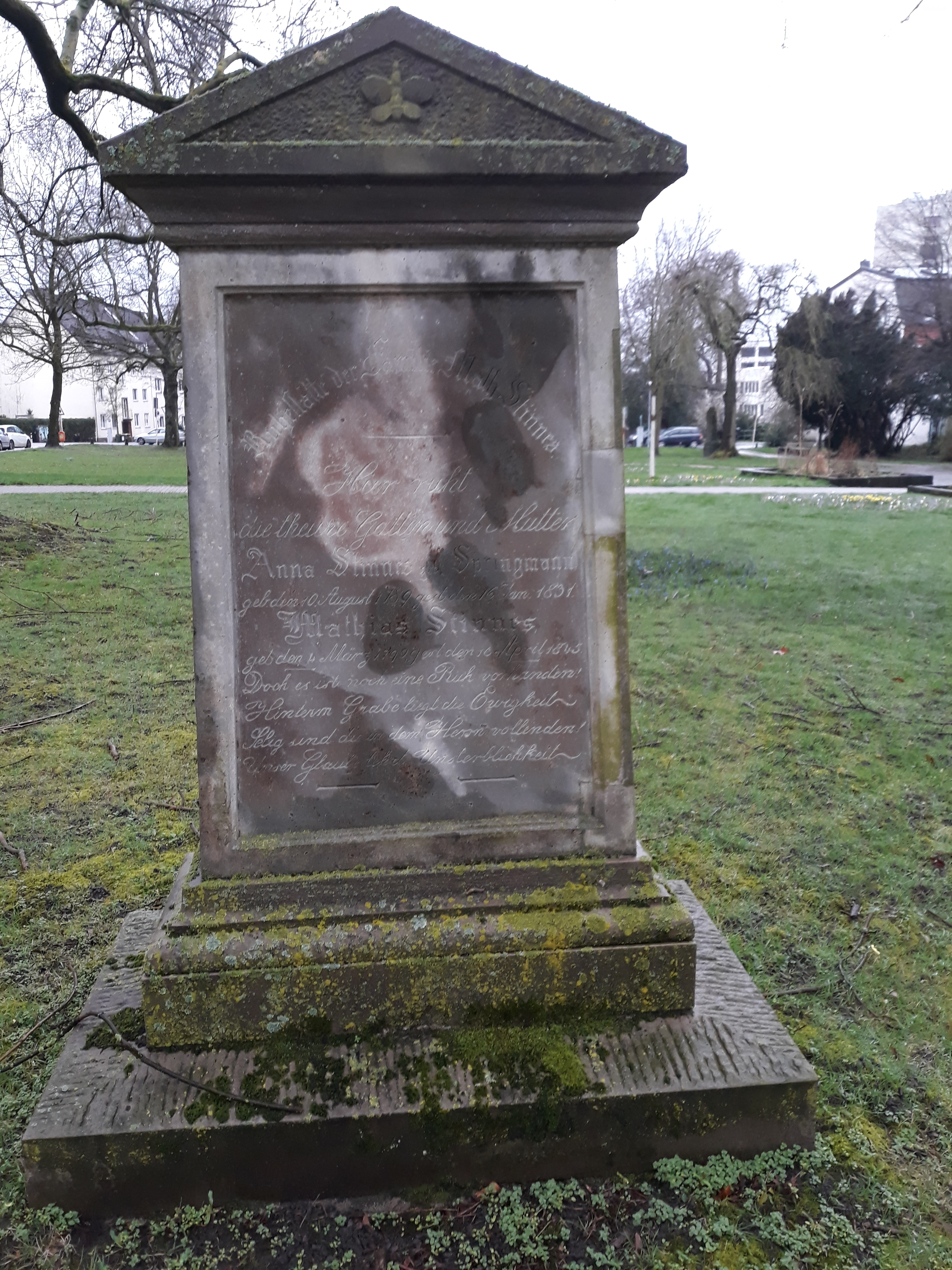 Das Grab des deutschen Kaufmanns Mathias Stinnes und seiner Ehefrau Anna auf dem Alten Friedhof in Mülheim an der Ruhr.